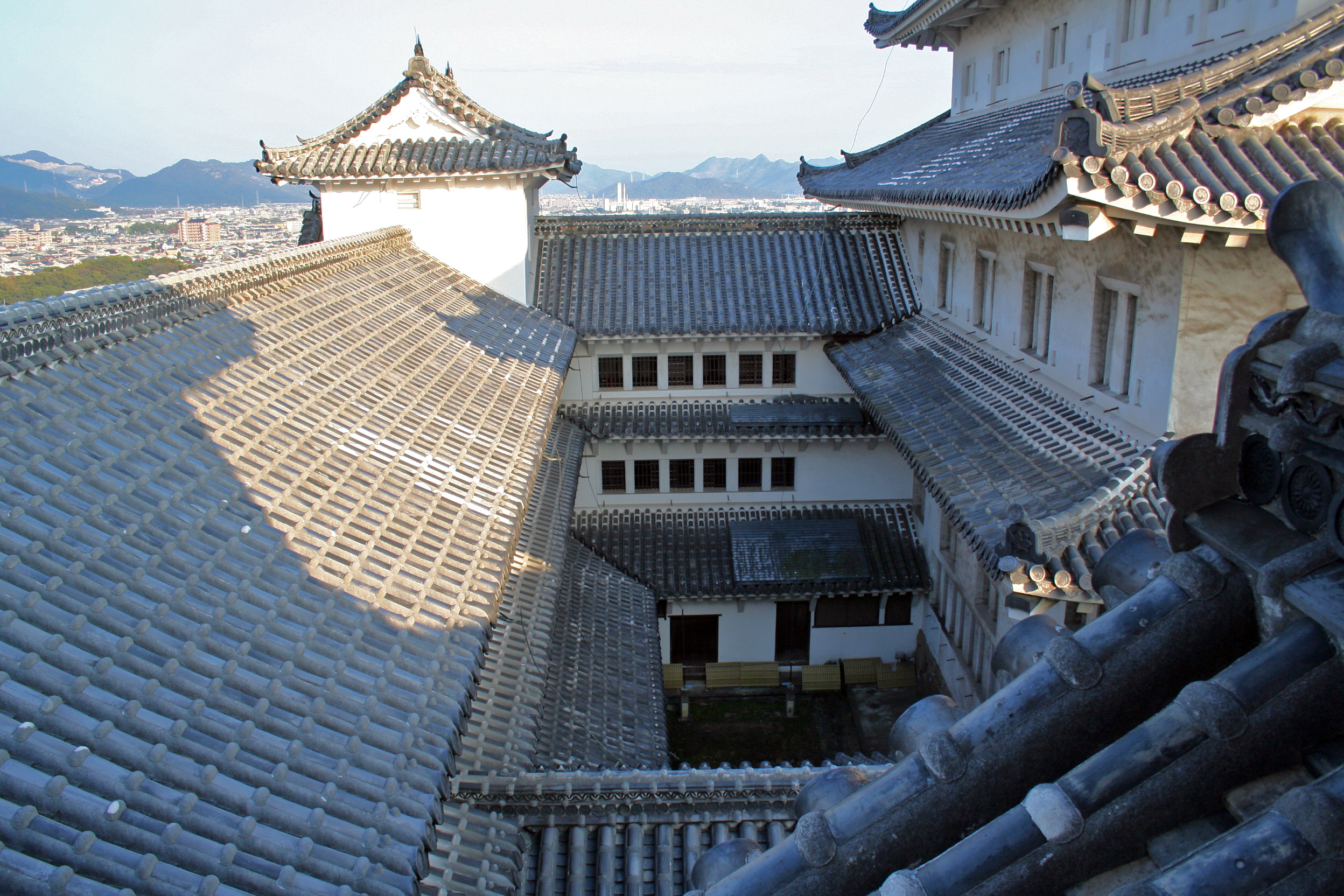 2009年秋の姫路城。 乾小天守から天守閣群の中心部を撮影。